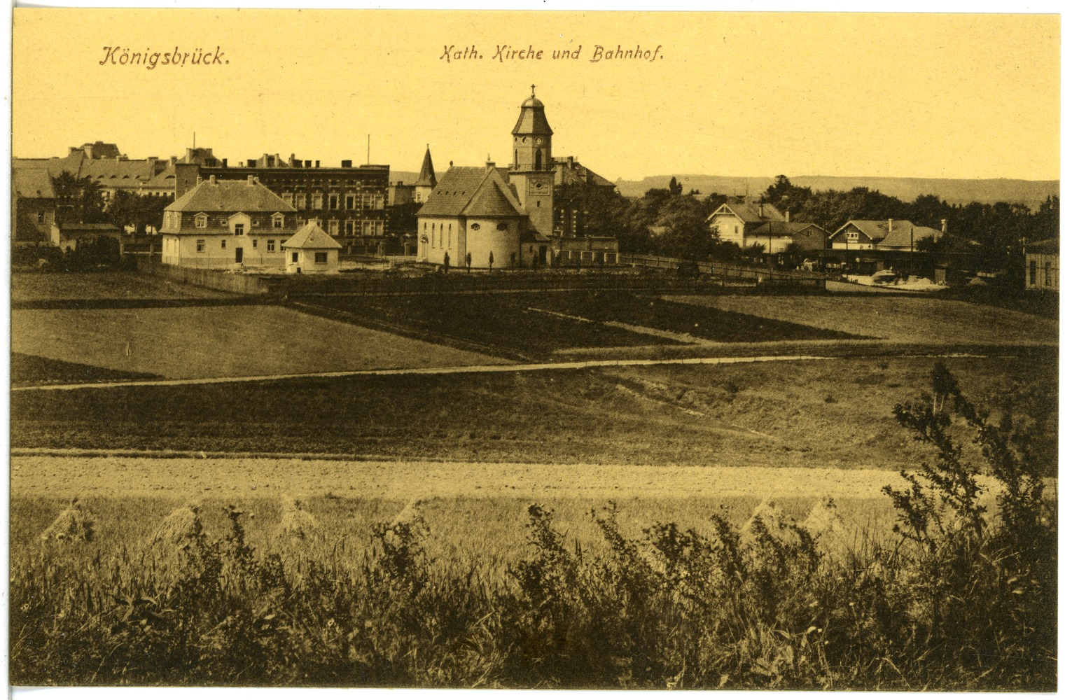 Königsbrück; Katholische Kirche und Bahnhof This postcard is from publisher Brück & Sohn in Meißen ( postcard has a unique number 19600 and is available in a higher resolution at the publisher. This images was uploaded in a cooperation project between Wikipedians and the publisher.